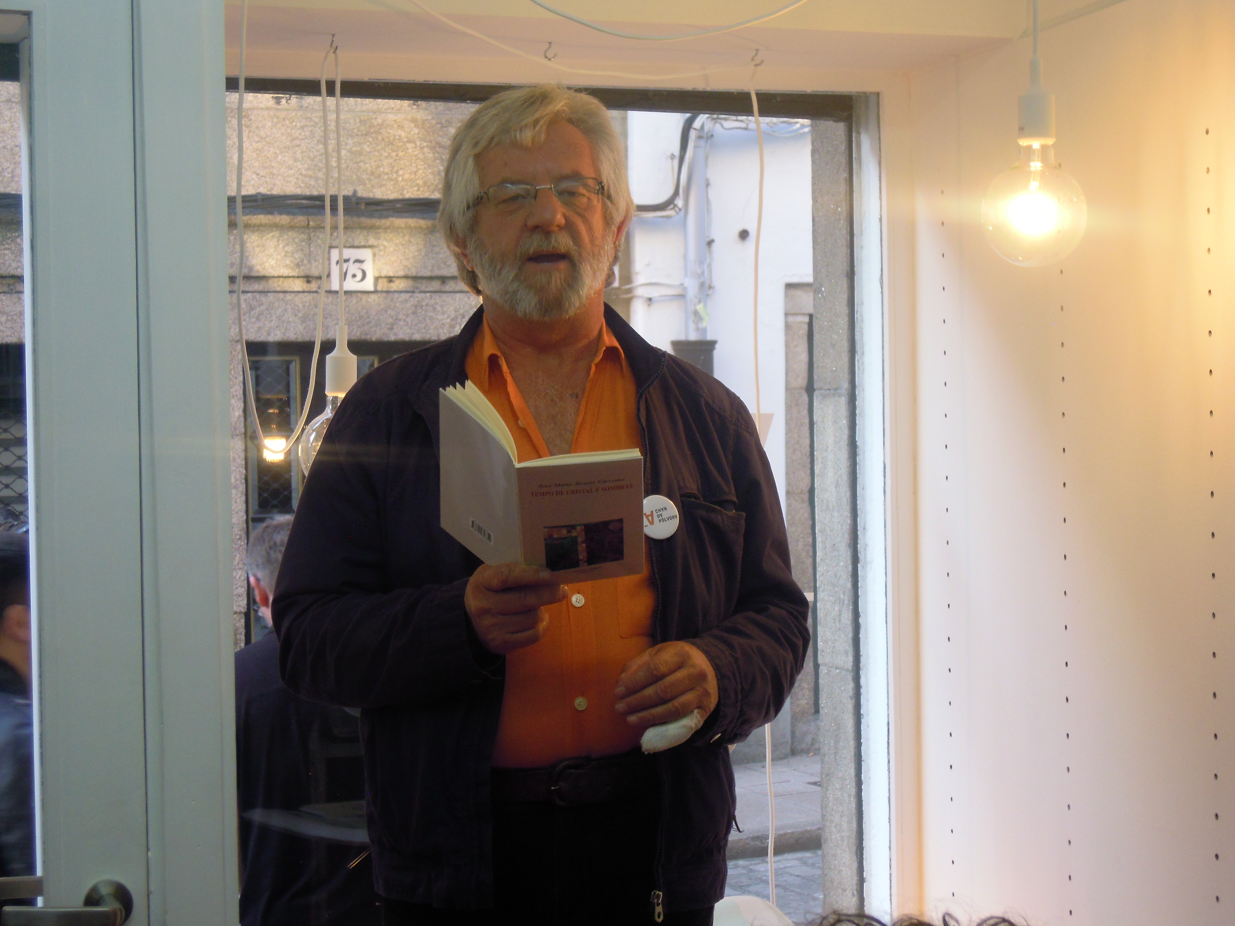 Xosé María Álvarez Cáccamo recitando na libraría Chan da Pólvora